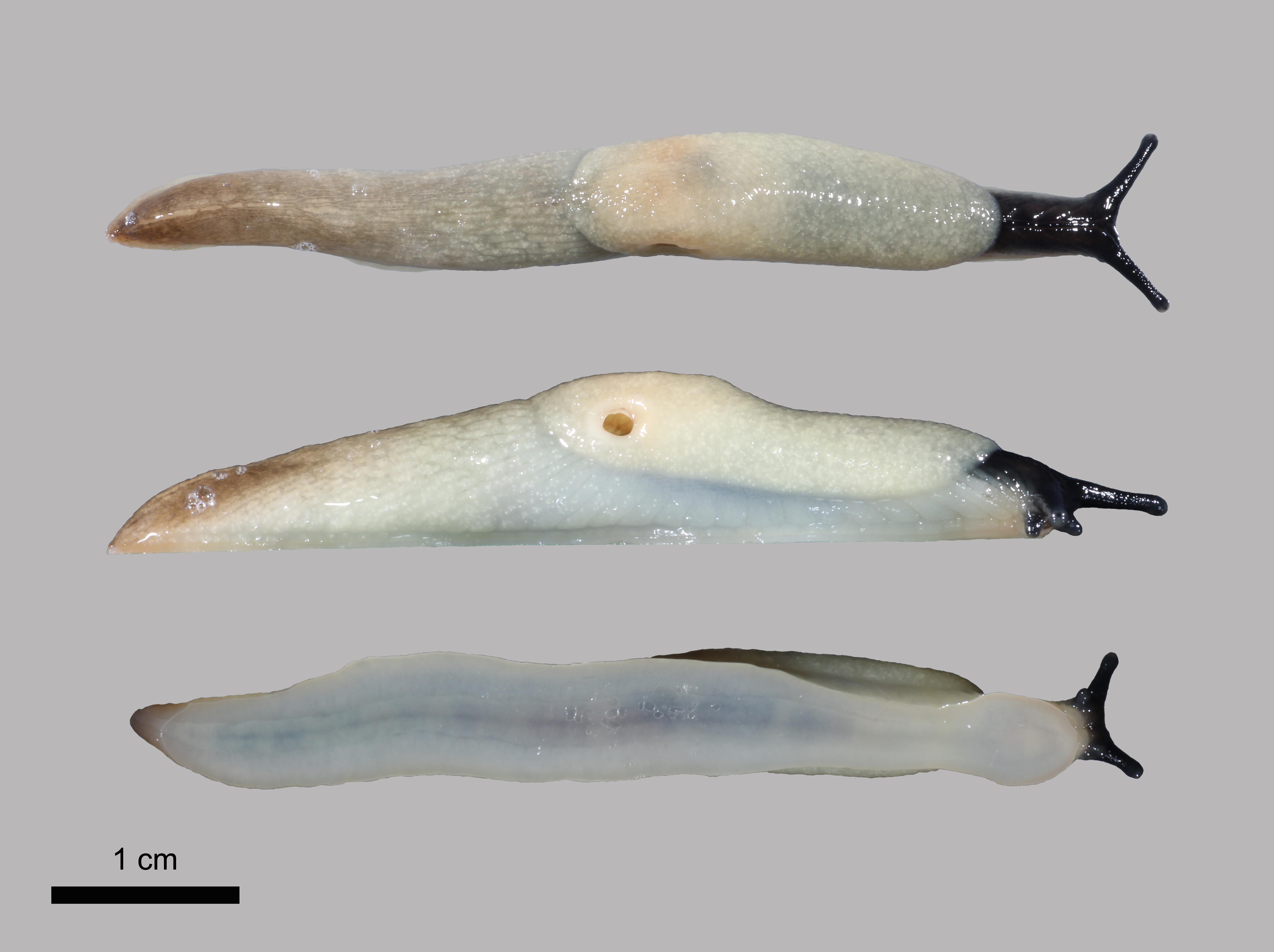 A feketefejű meztelencsiga külső morfológiája három irányból (fotó: Turóci Ágnes)